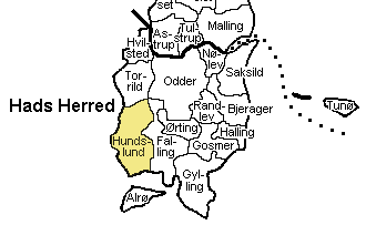 Kort der viser Hundslund Sogn, Hads Herred, Århus Amt, Denmark.